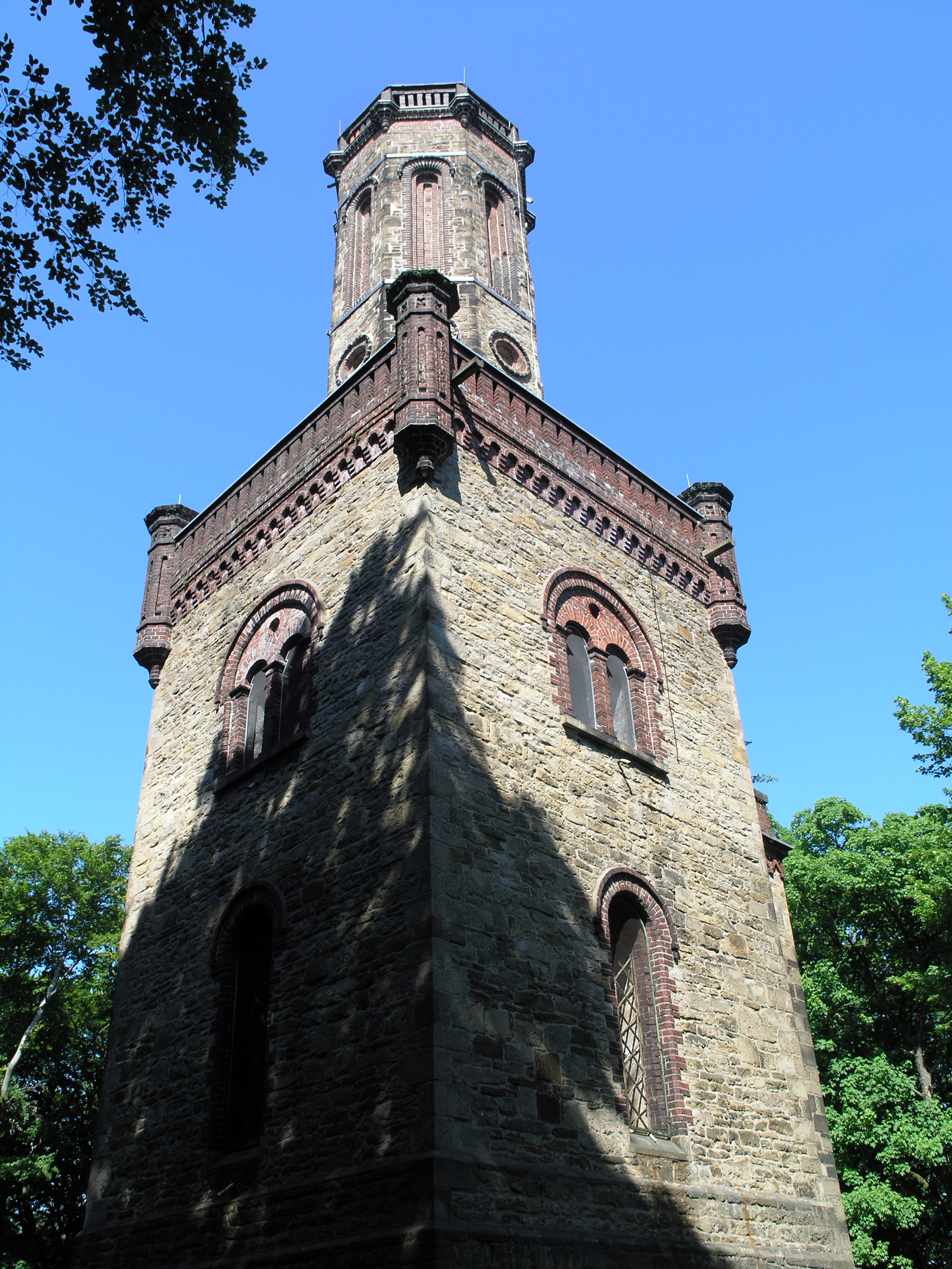 Северный Рейн-Вестфалия, Хаген - гора Кайсберг, башня барона фом Штейна